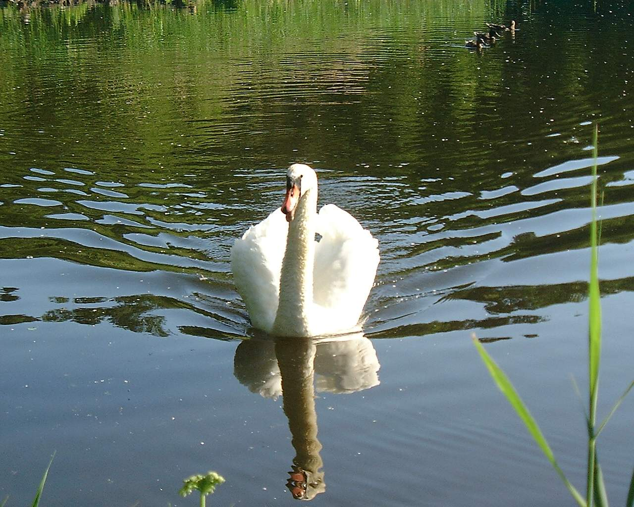 Laduviken, Djurgården, Stockholm, Sweden.